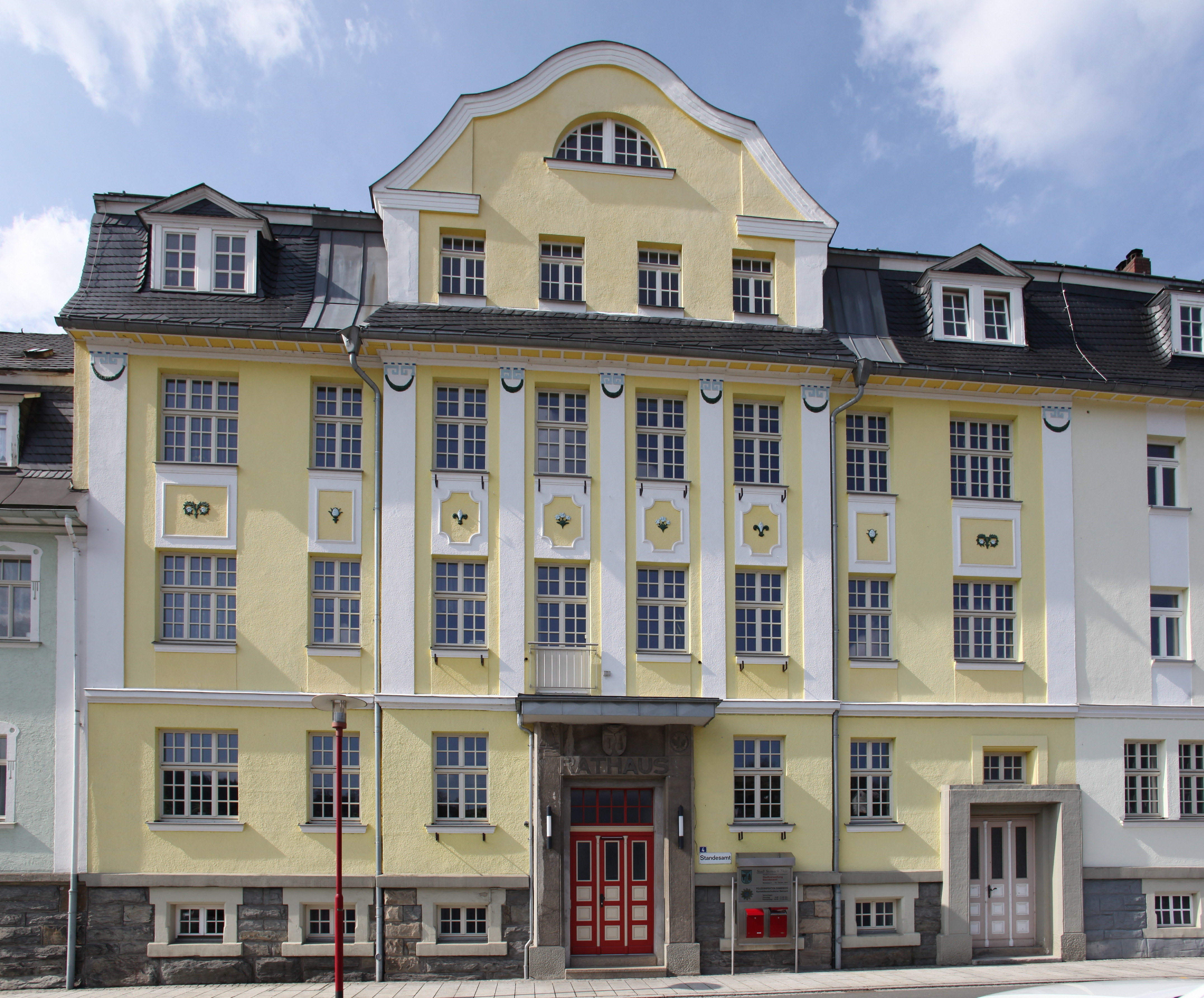 Rathaus in Steinach in Thüringen